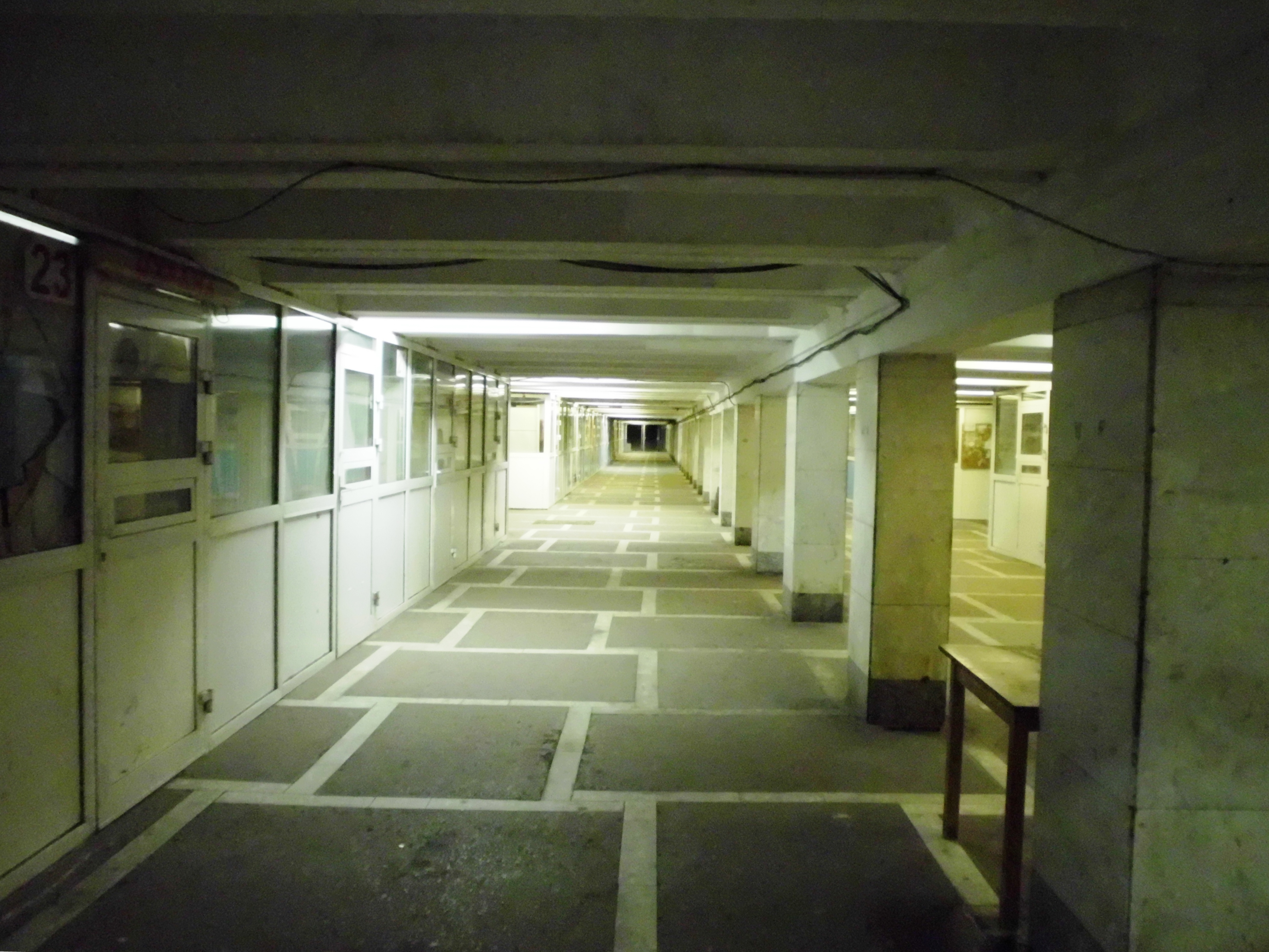 Здание заводоуправления ЧТЗ, которое посетили деятели государства и работали видные ученые: проспект Ленина, 3, Челябинск, Челябинская область.Подземный переход с торговыми павильонами под проезжей частью проспекта Ленина на территорию завода.